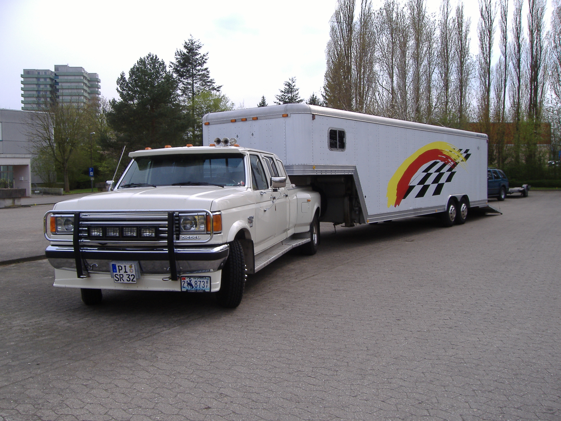 Motorsport, Ford F-350 Crew Cab Duallie mit Fifth Wheel Auflieger